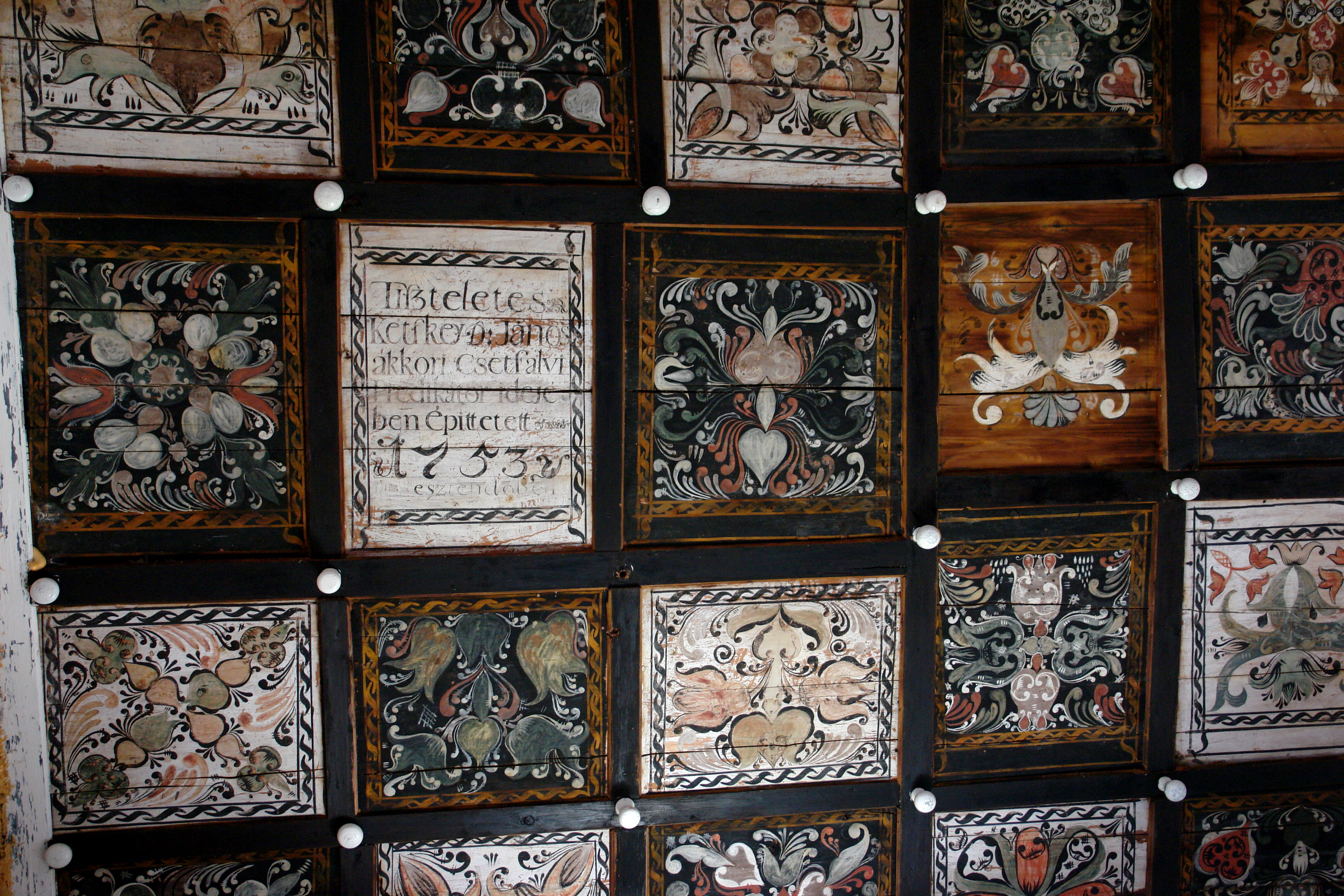 Реформаторська церква з дзвіницею (зміш.), Четфалва